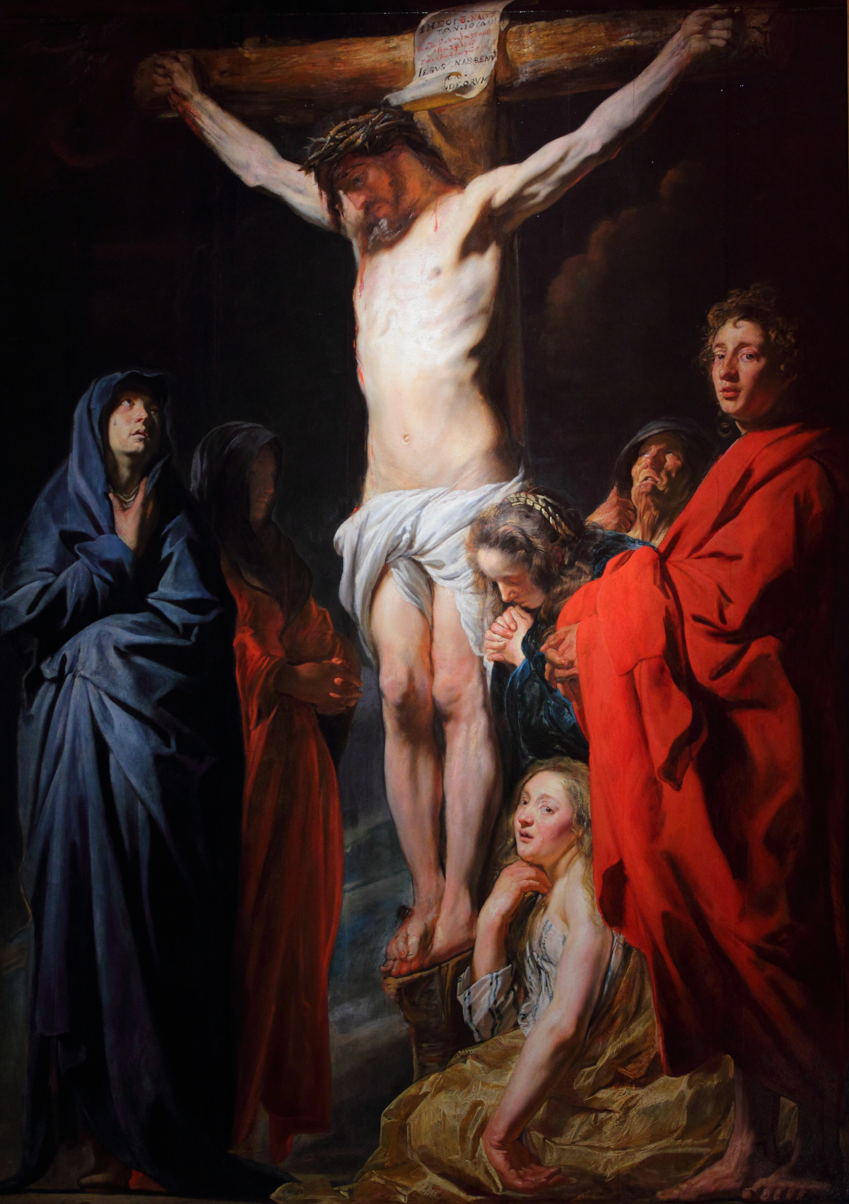 Crucifixion by Jacob Jordaens